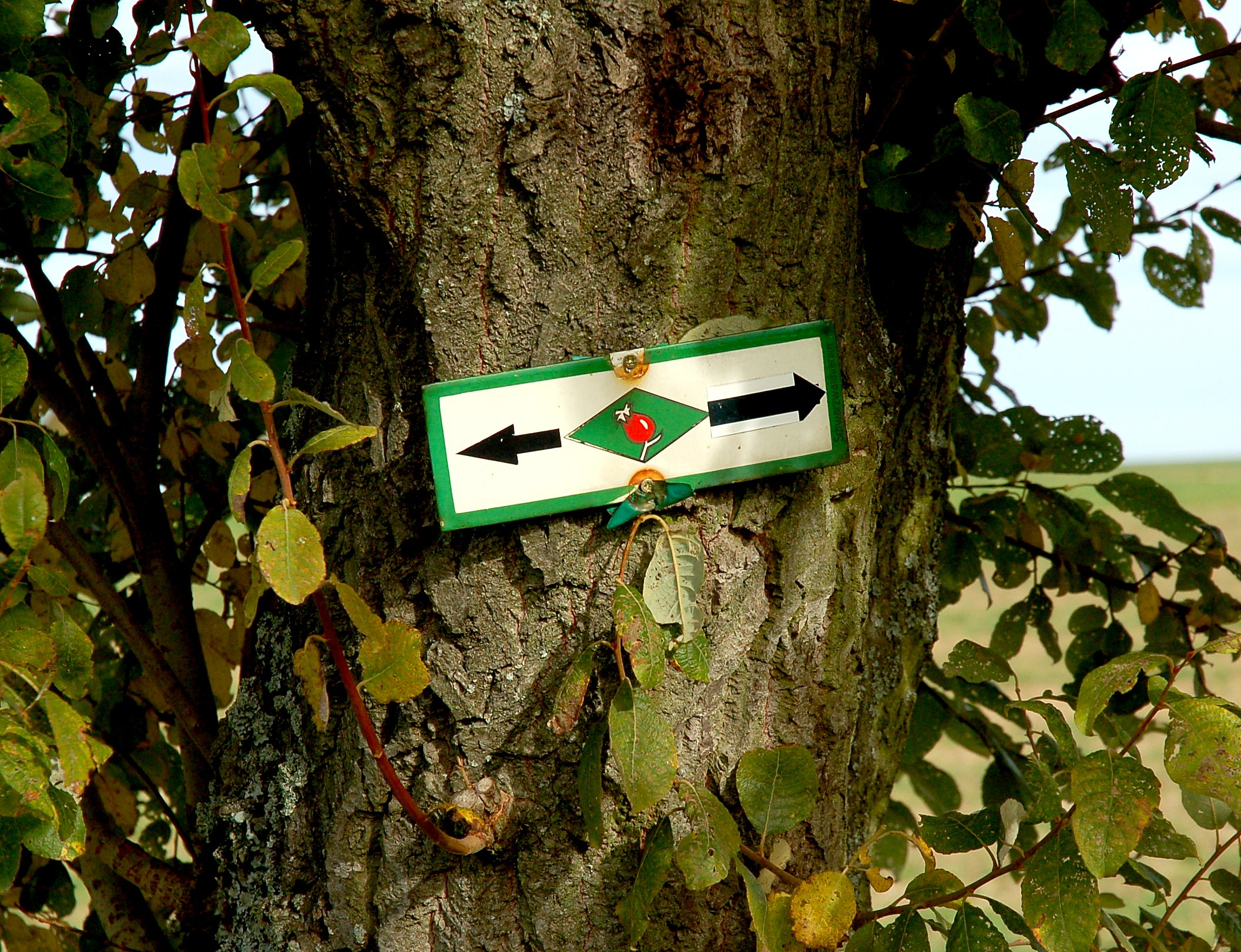 Die rote Hagebutte vor einer grünen Raute markiert den Gäurandweg.